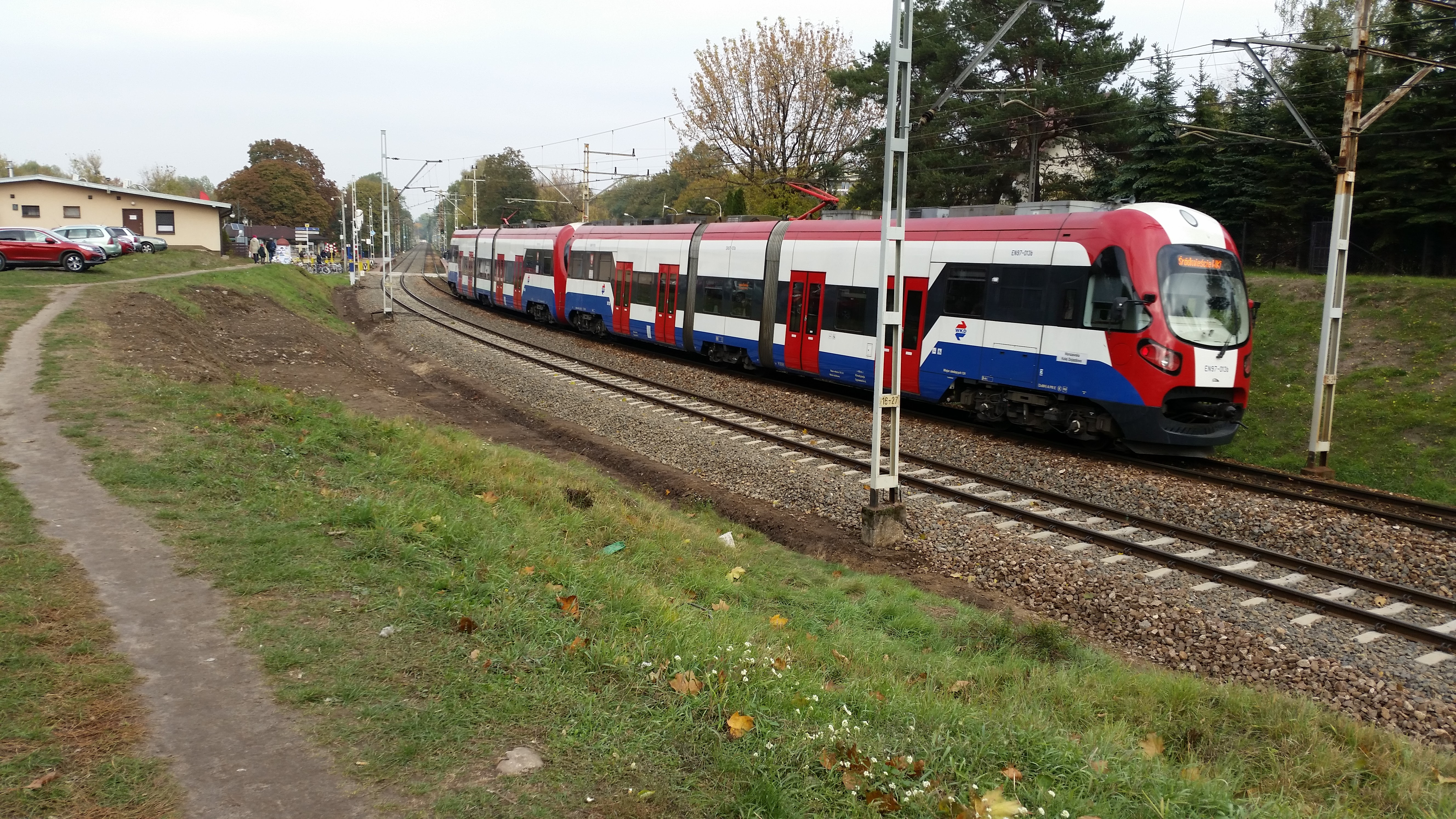 Kolej WKD wjeżdża na stację Pruszków WKD od strony Komorowa.